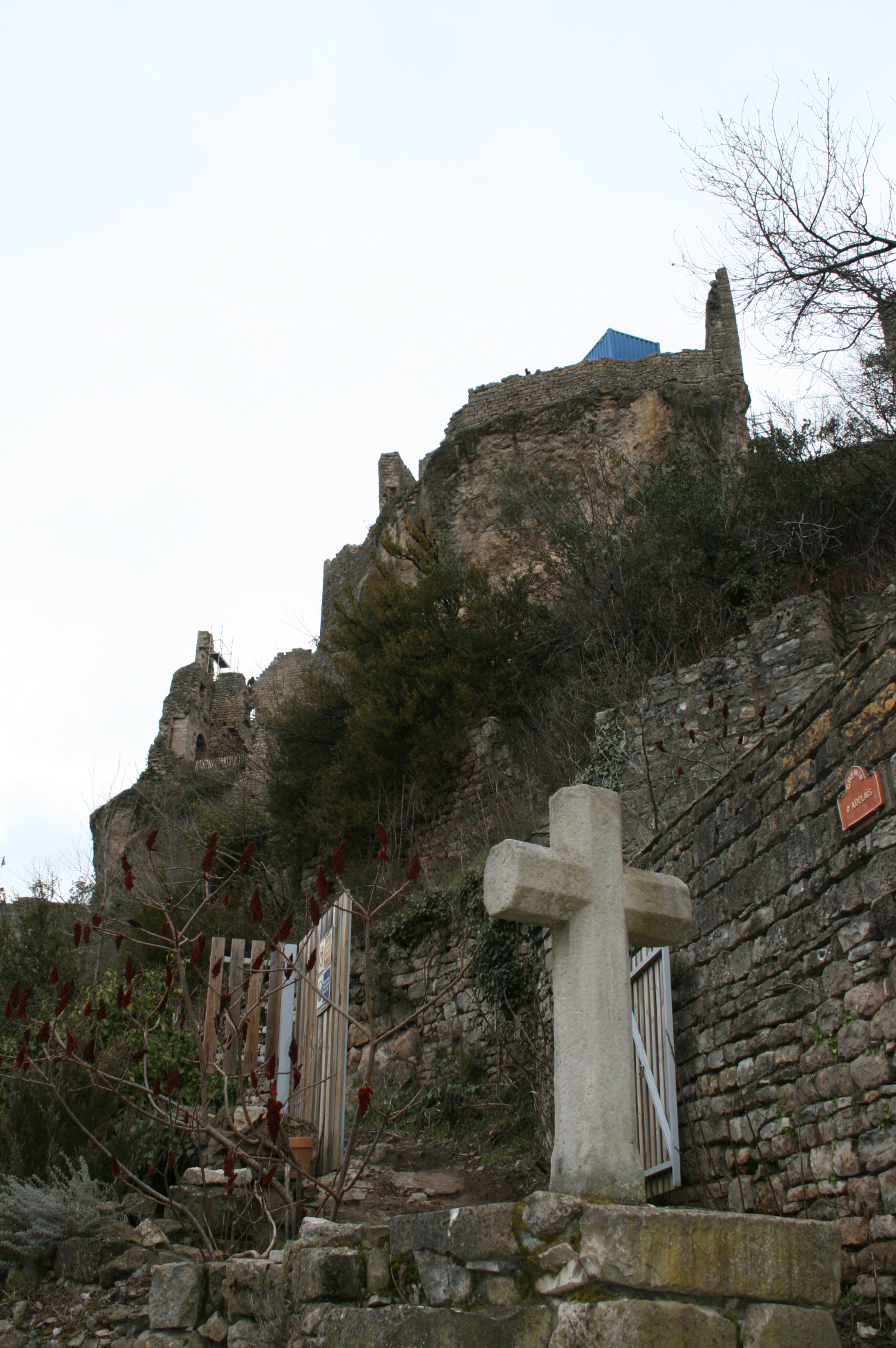 Poble d'Occitània (França)